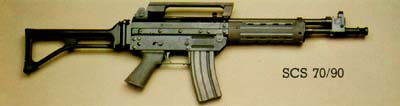 Fucile d'assalto Ar70/90 SCP in dotazione alla Brigata Folgore dell'Esercito Italiano